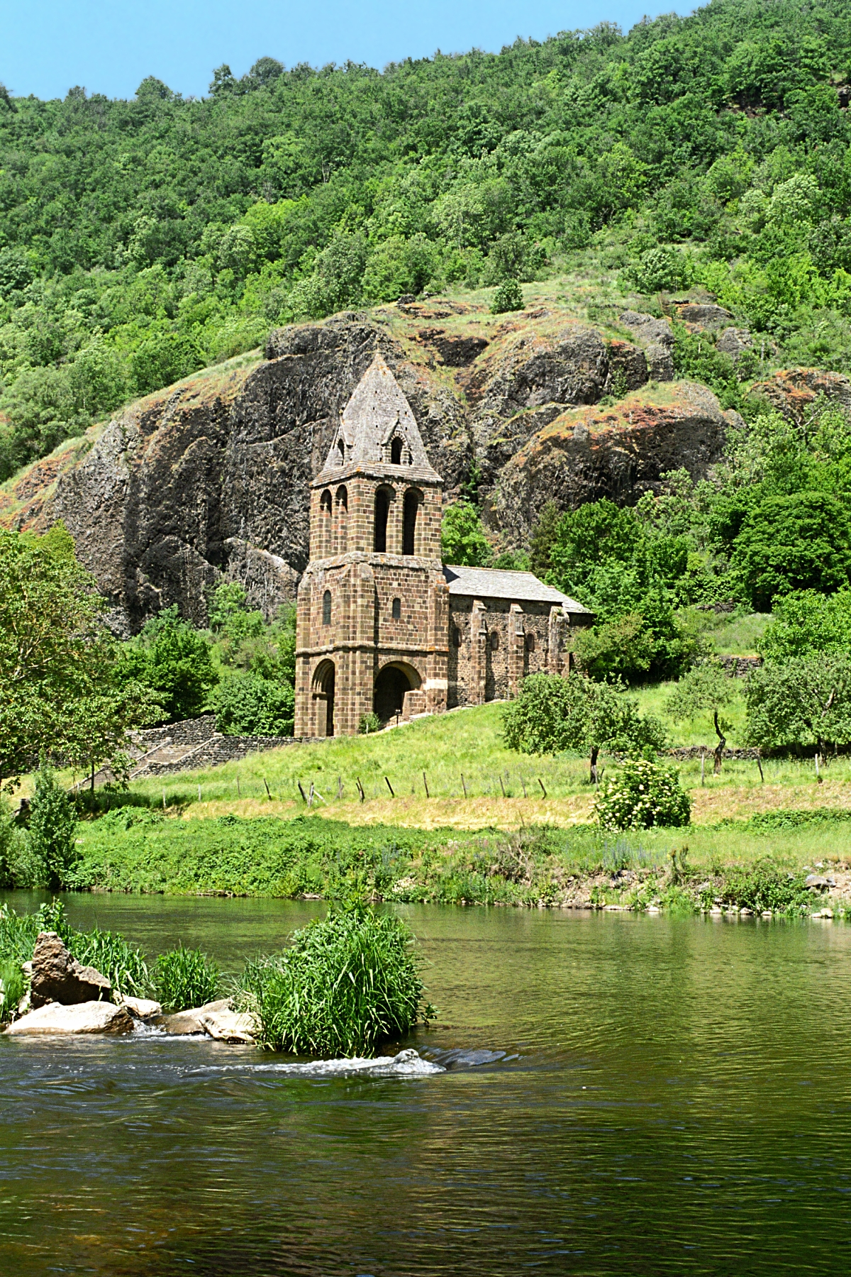 France - Auvergne - Haute-Loire - Chapelle Sainte-Marie-des-Chazes